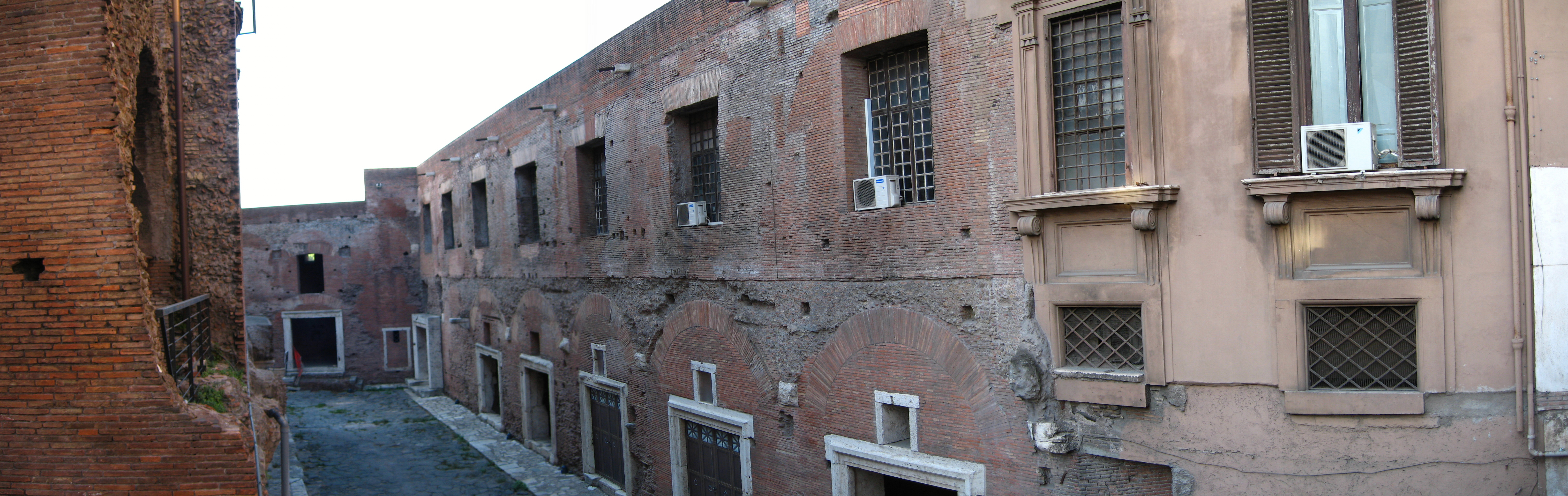 Via Biberatica, Trajan's Market, Rome